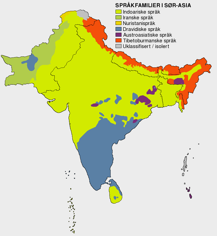 Norsk (bokmål): Kart over Sør-Asia med oversikt over hvilke språkfamilier som snakkes.